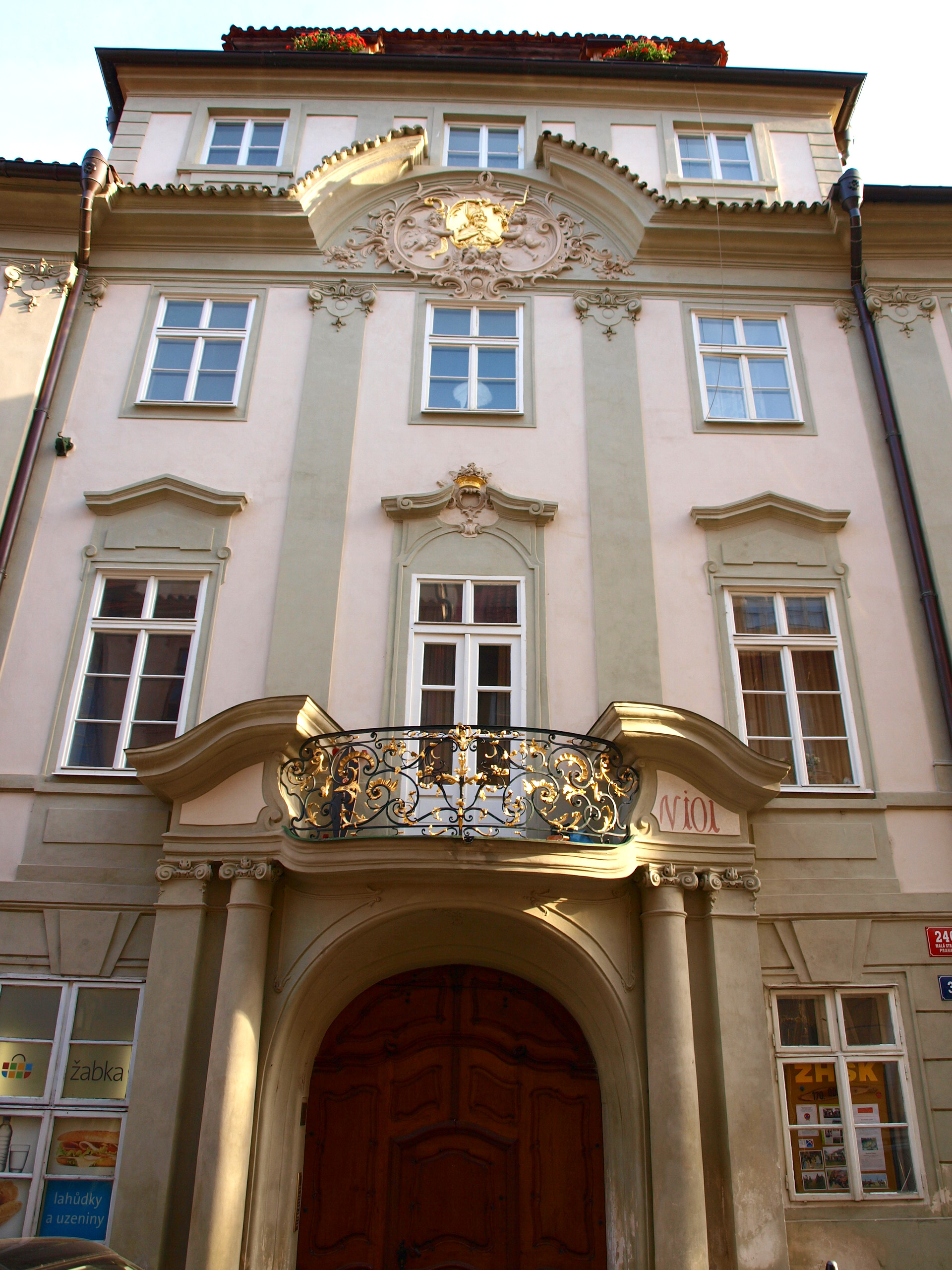 Česky: Bretfeldovský palác, Nerudova ulice